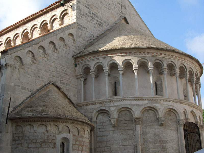 St. Grisosono's Church in Zadar (Sv. Krševan)